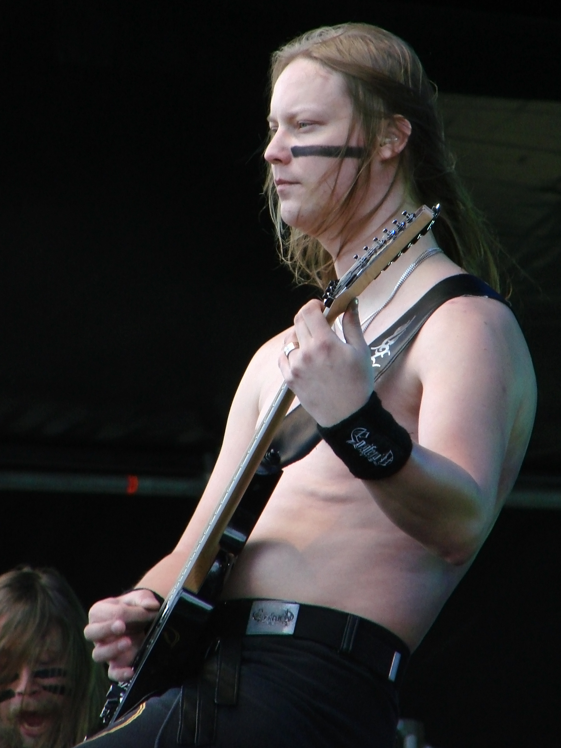 Ensiferum au Hellfest 2010, à Clisson, le 20 Juin 2010 : Petri Lindroos.